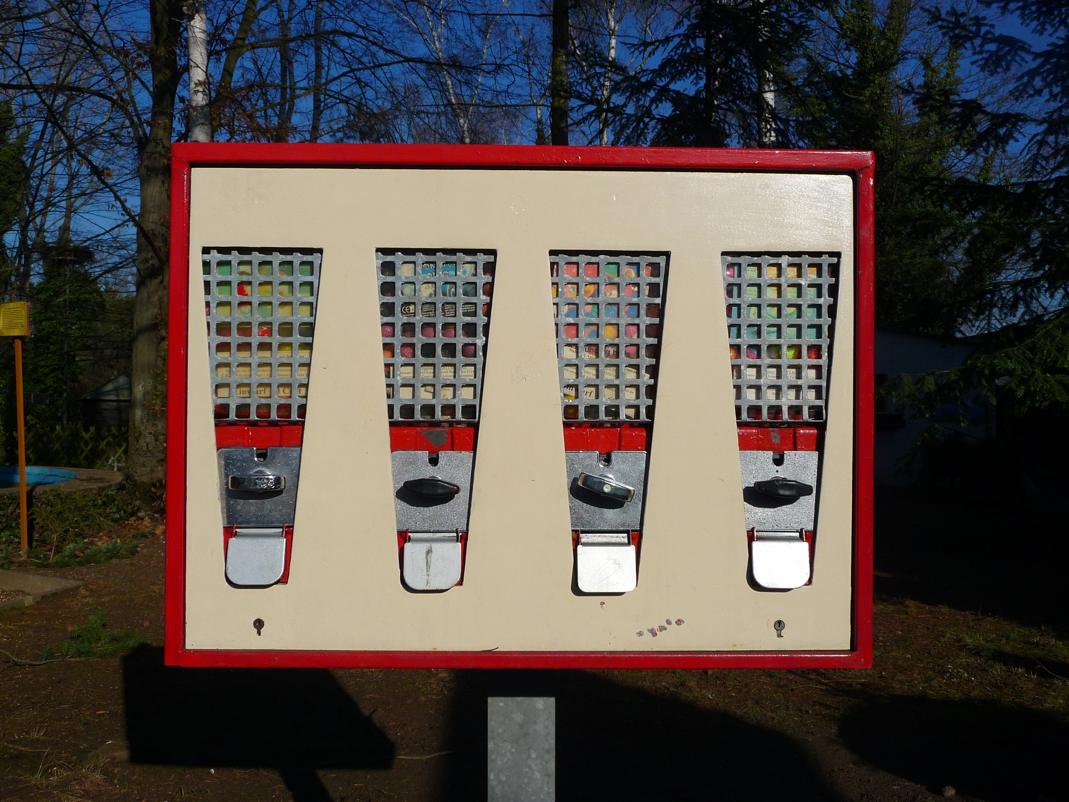 Kaugummiautomat